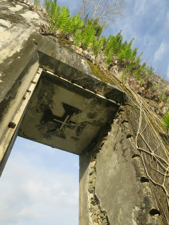 Same, Manufahi